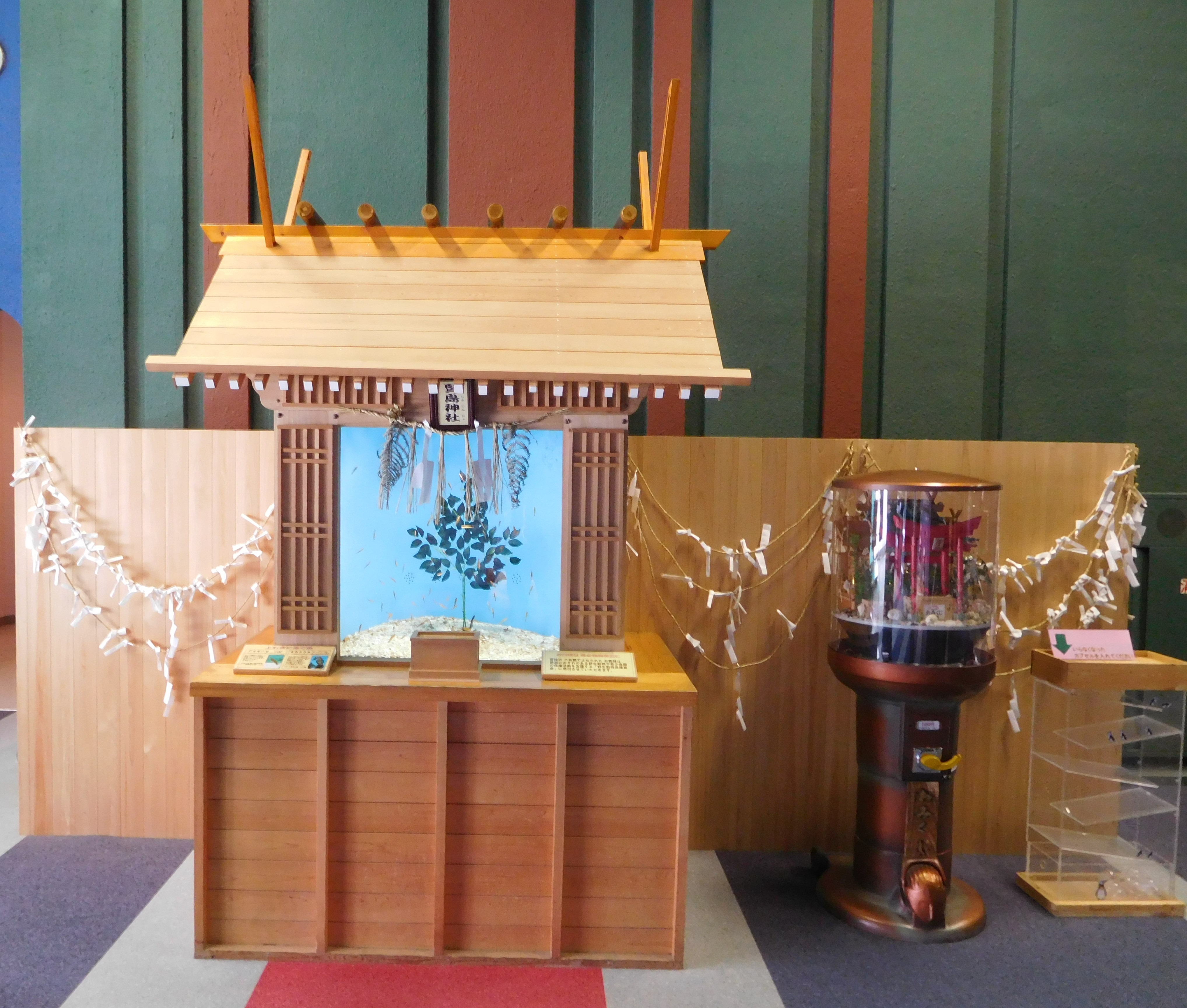 三重県志摩市阿児町神明賢島にある、志摩マリンランド内の神社、賢島神社（かしこいしまじんじゃ）。ご神体はタツノオトシゴ類。